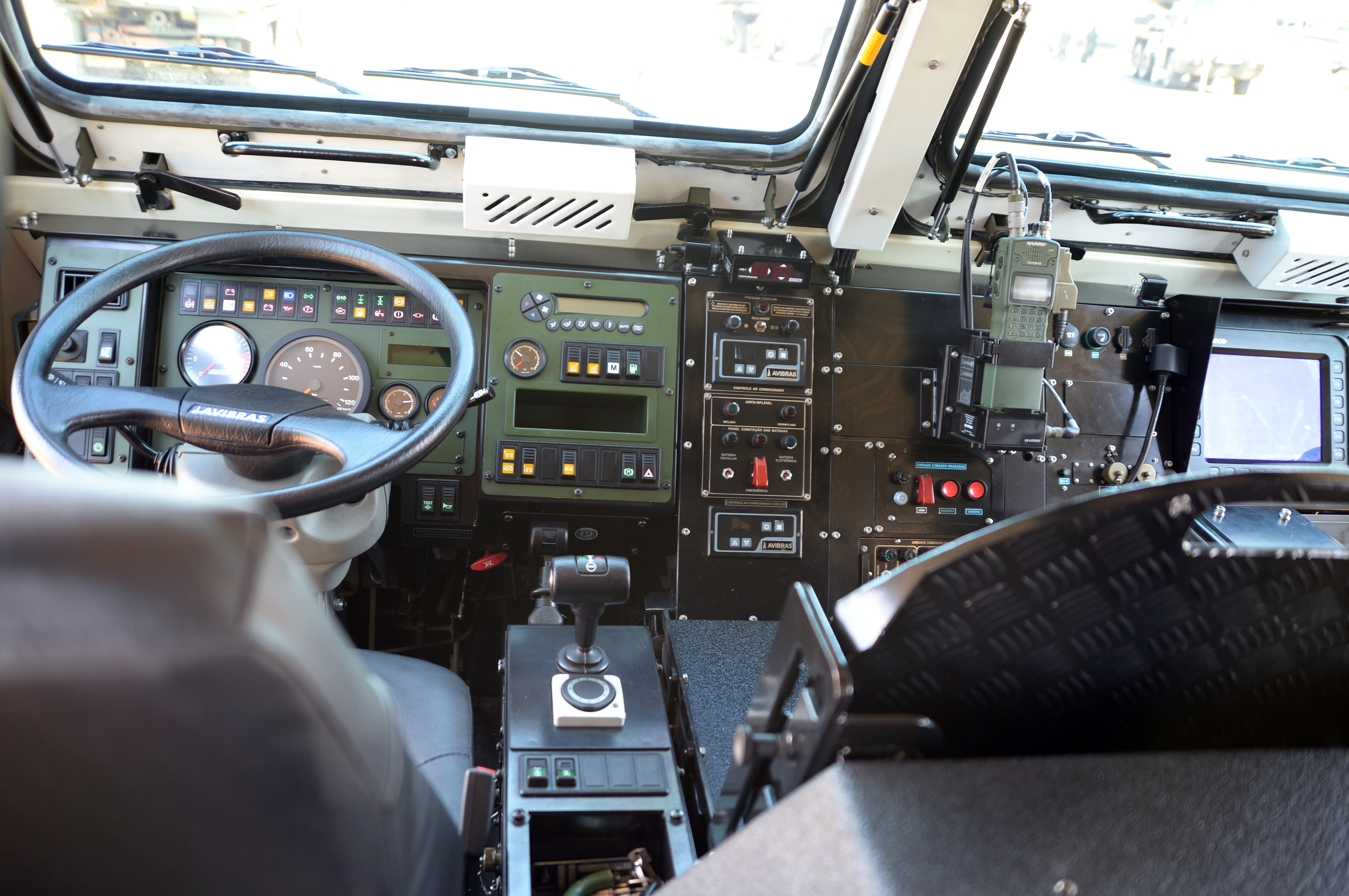 06/06/2014, Formosa - GO Fotos: Jorge Cardoso